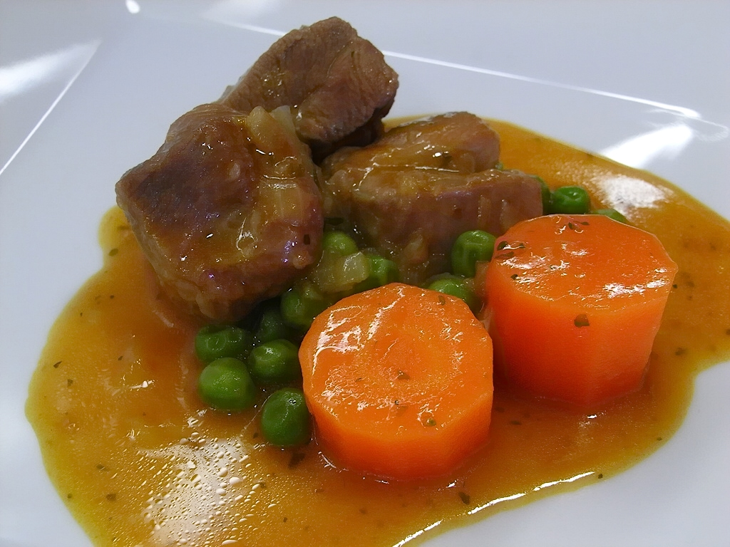 Ragout de Pavo con Zanahorias y Guisantes (spanisch für „Putengeschnetzeltes mit Karotten und Erbsen“) – Ragout aus Putenfleisch mit Sauce und Gemüsebeilage aus Karotten und Erbsen.